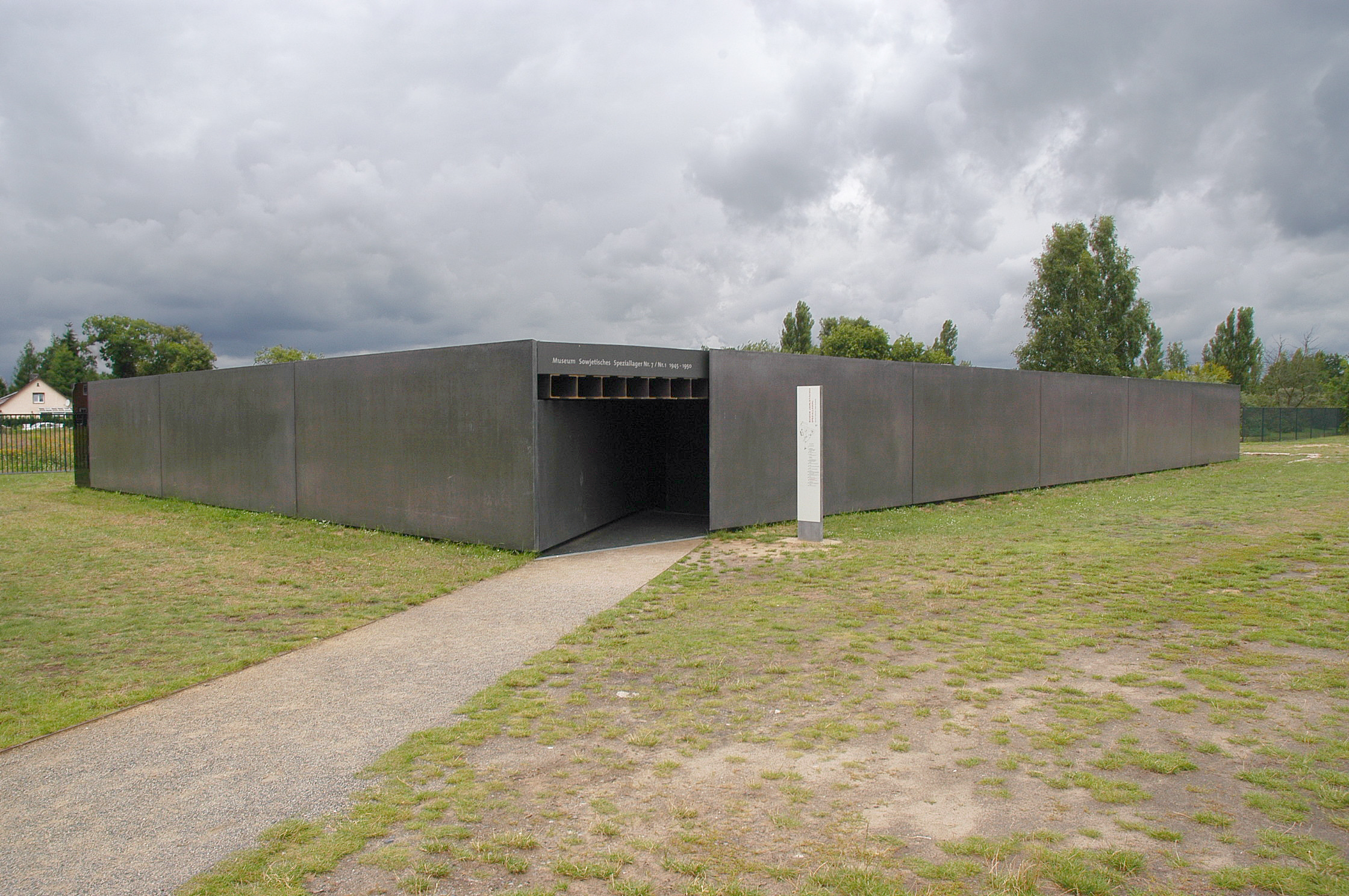 Museum Sowjetisches Speziallager (Soviet Special Camp Museum)